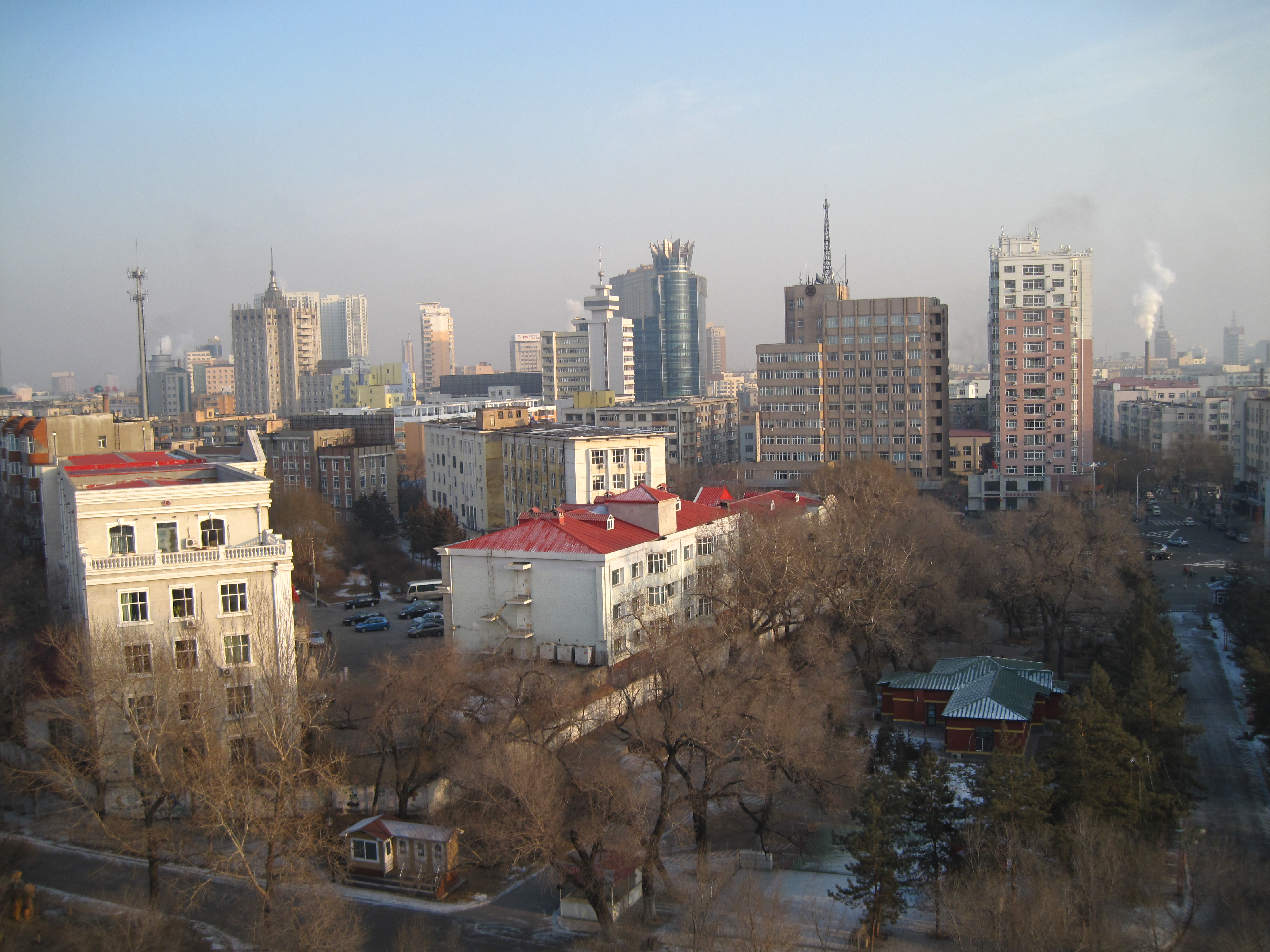 齐齐哈尔天际线，摄于龙沙公园。